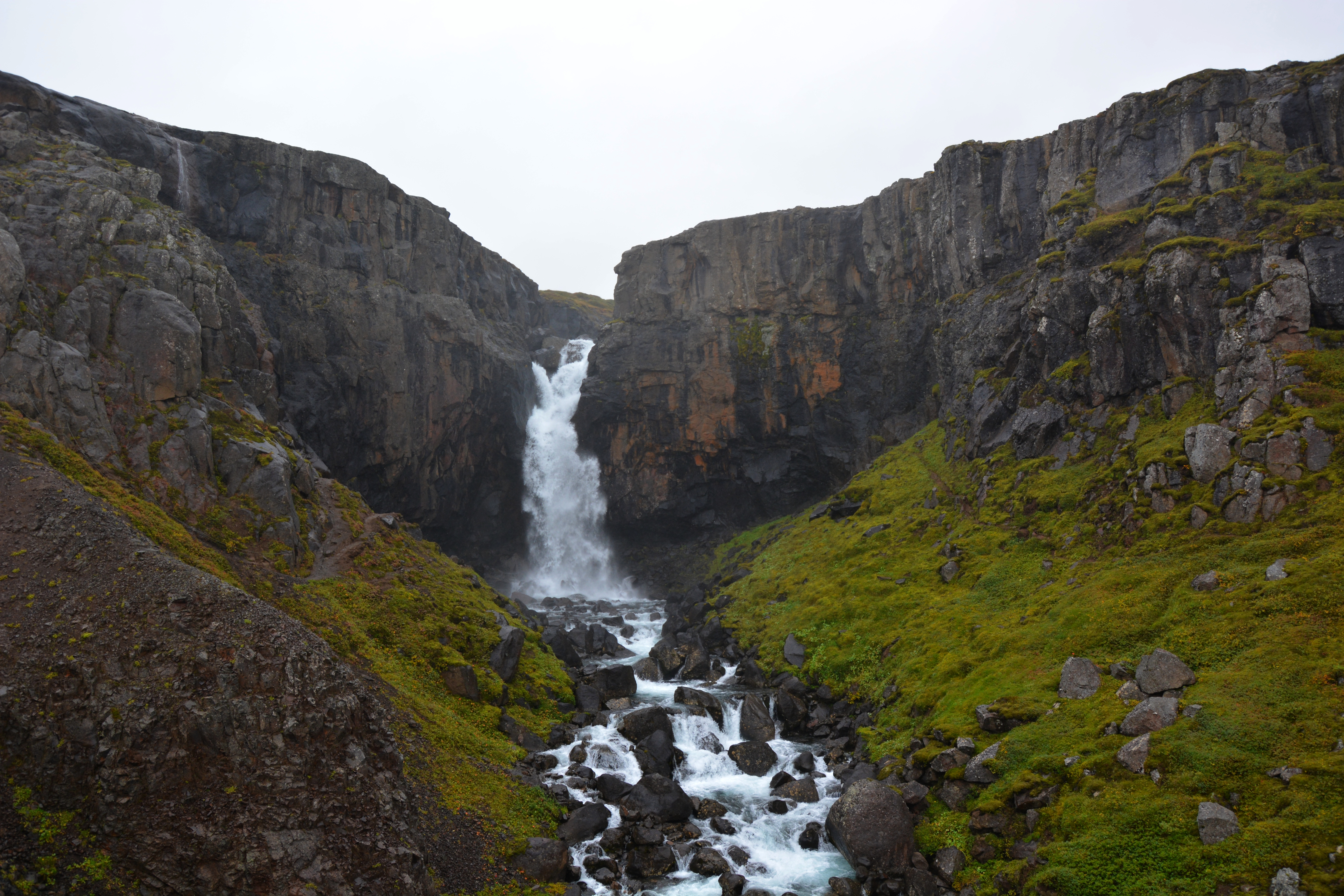 Cascade de Fardagafoss, Islande